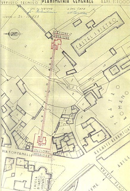 Pianta funicolare Verona